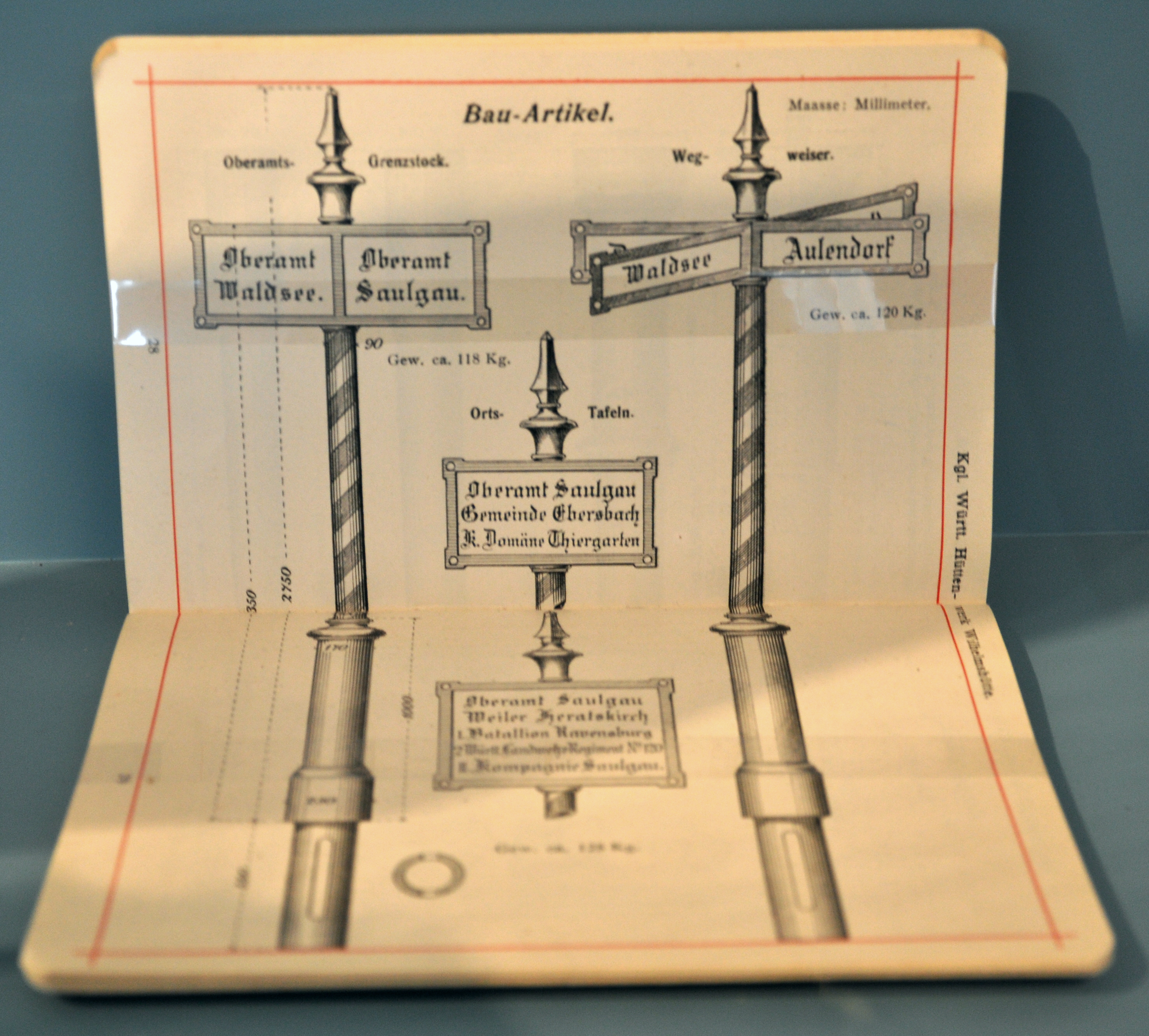 Verkaufskatalog der Wilhelmshütte Schussenried, hier: Oberamtsgrenzstock, Ortstafel und Wegweiser